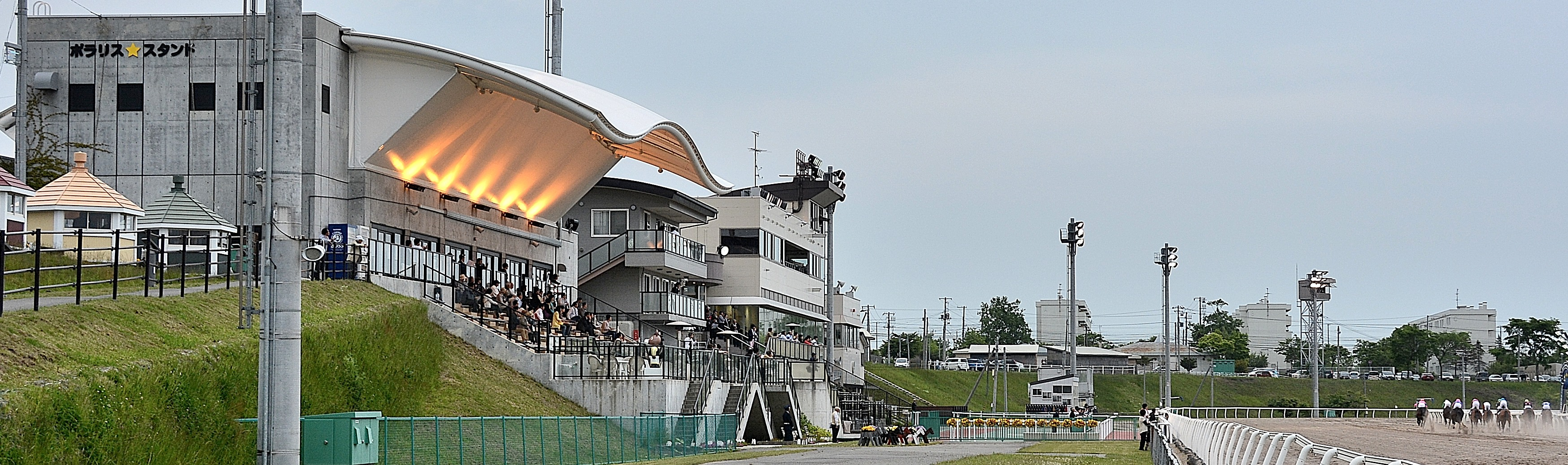 2015年6月2日に、門別競馬場の馬場とスタンドの俯瞰視点を、観客エリアから撮影したもの。